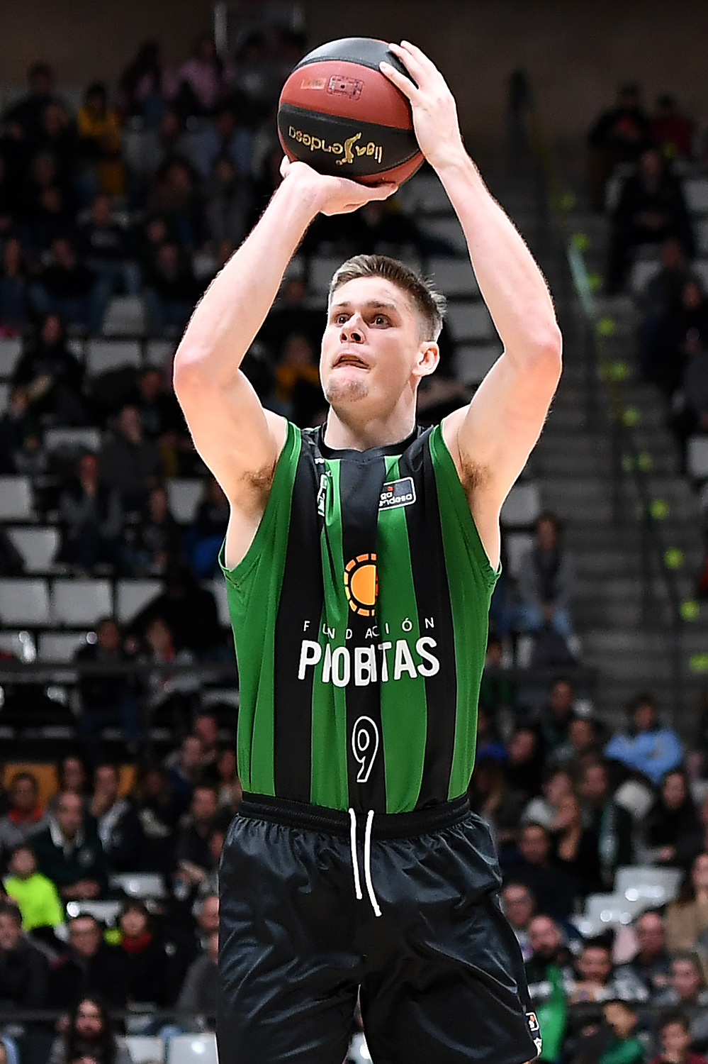 Conor Morgan en un partit de l'ACB 2019-20 amb el Club Joventut Badalona